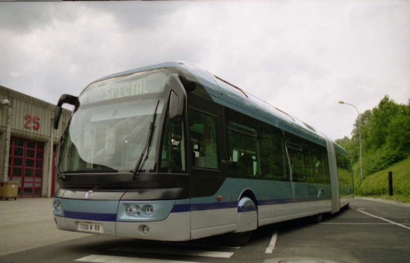 Irisbus Civis à face avant de Cristalis, livrée TEOR (Rouen).